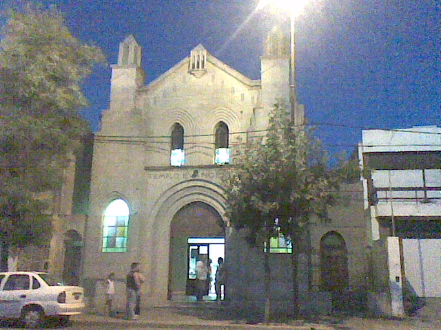 la iglesia mas grande de coronel dorrego